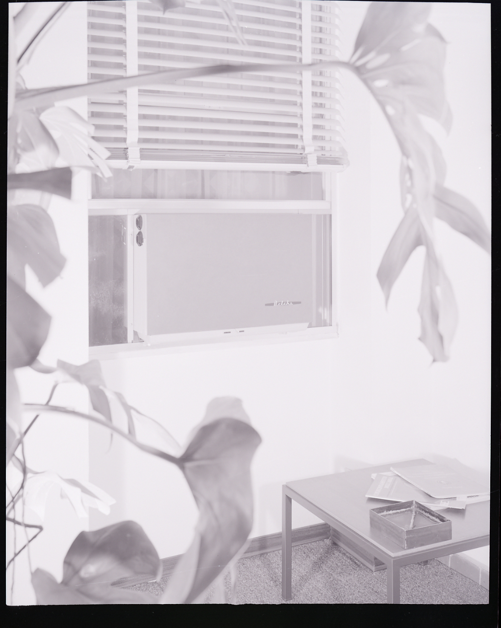 Borsani arredamenti? ufficio? Interni. Climatizzatore Delchi (oggi Carrier-Delchi). Servizio fotografico : Milano, 1965 / Paolo Monti. - Buste: 6, Fototipi: 6 : Negativo b/n, gelatina bromuro d'argento/ pellicola ; 10x12. - ((Serie costituita da 6 buste di negativi identificati con una doppia numerazione (da 43266 a 43277): 24385, 24386, 24387, 24388, 24389, 24395. Le buste nn. 24385-24389 sono tenute insieme da una graffetta. - Sul negativo identificato con il n. 24395 intervento di mascheratura a mattoleina?. - Nella rubrica citata nel campo Fonti in corrispondenza degli estremi numerici della serie iscrizione didascalica manoscritta: "Appartamenti trevisani". La doppia numerazione potrebbe corrispondere ai lavori realizzati durante il periodo di attività del laboratorio e studio fotografico "Foto Studio 22", società che risulta essere stata aperta il 10/04/1961, con partecipazione, nel ruolo di gerente, di Vincenzo Carrese. - Fonte: Rubrica di Paolo Monti: Archivio 10x12 (ultimi numerati) - dal G1 al (s.d.), presso Archivio Paolo Monti